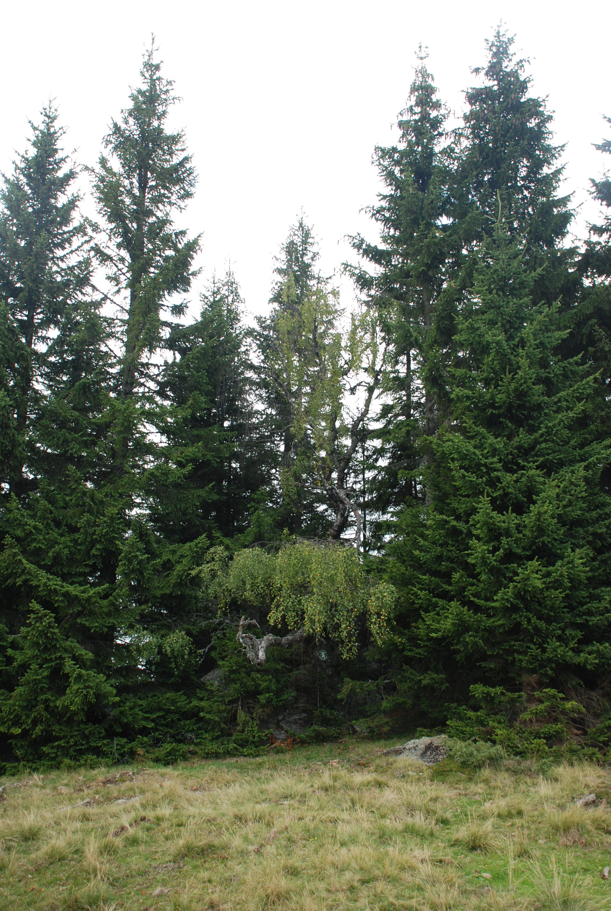 Birkenkögerl – Standort des ehemaligen Naturdenkmal auf der Freiländer Alm, Klosterwinkel, Steiermark – Danke an Franz Moser für den Standorthinweis